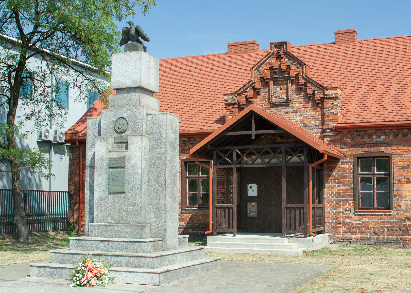 Murowanka czyli dawna szkoła w Wawrze (po remoncie), a przed nią pomnik poświęcony pamięci Józefa Piłsudskiego oraz poległych w obronie ojczyzny w latach 1918-1920. Napisy: Wokół profilu Piłsudskiego: JÓZEF PIŁSUDSKI Najwyższa tablica: ROK 1930 PIERWSZEMU MARSZAŁKOWI JÓZEFOWI PIŁSUDSKIEMU BUDOWNICZEMU POLSKI ODRODZONEJ W DZIESIĄTĄ ROCZNICĘ WYZWOLENIA OJCZYZNY OD NAJAZDU BOLSZEWICKIEGO Środkowa tablica: OBYWATELE WAWRA I GMINY WAWER PADLI NA POLU CHWAŁY ODPIERAJĄC OD GRANIC PAŃSTWA POLSKIEGO POD WODZĄ JÓZEFA PIŁSUDSKIEGO NAWAŁĘ NAJEŹDŹCÓW W LATACH 1918-1920 Dolna tablica: OSMELIŃSKI JÓZEF UCZEŃ PEŁKA MICHAŁ ROBOTNIK WÓJTOWICZ JÓZEF ROBOTNIK 1 LISTOPADA 1930 Lokalizacja Murowanka : ul. Płowiecka 77, Warszawa 52.22975953498967 N, 21.13824722434083 E pomnik: okolica ul.Płowiecka 77 w Warszawie (w Wawrze)